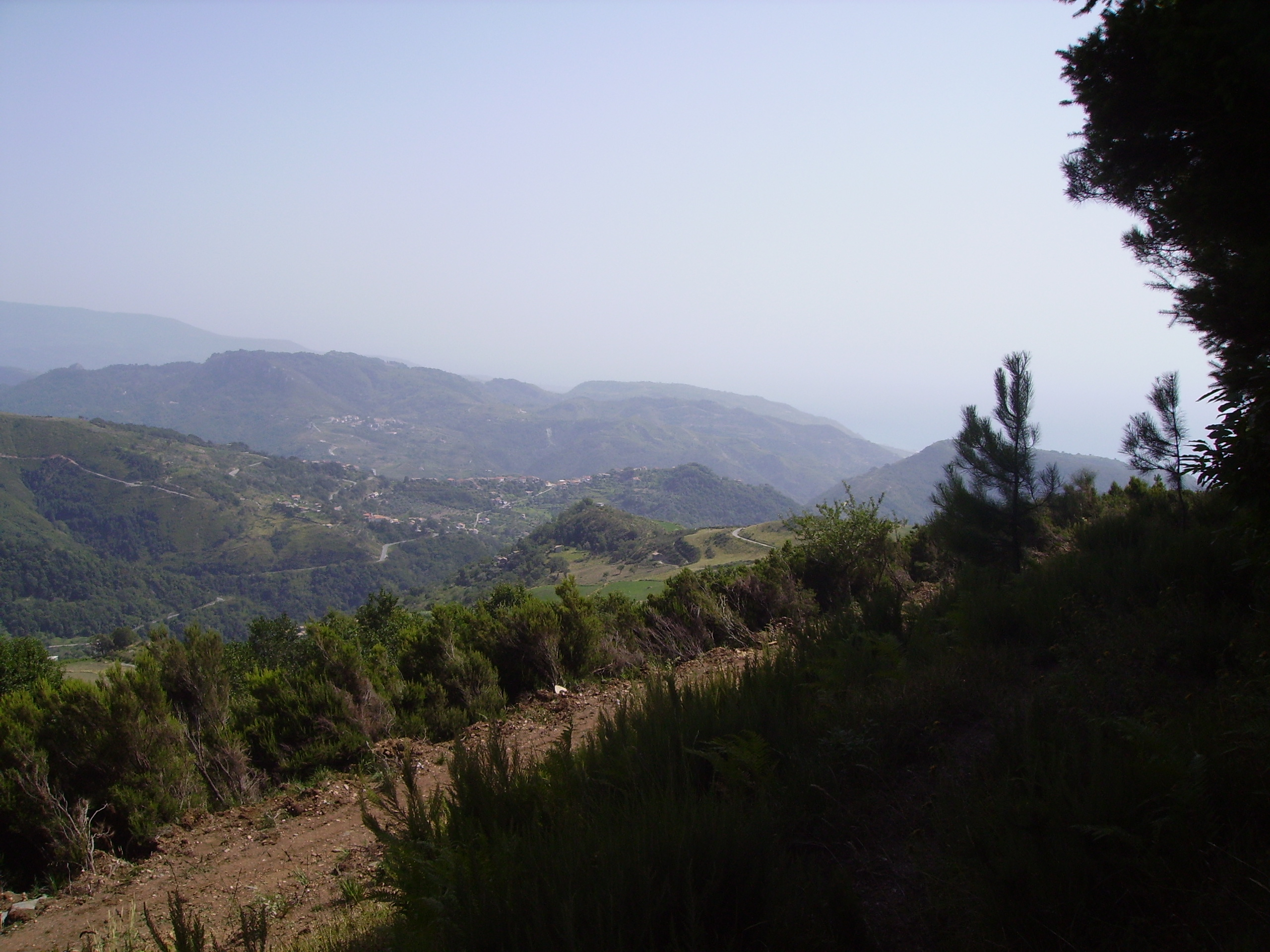 Panorama dalla località Campo di Belmonte Calabro